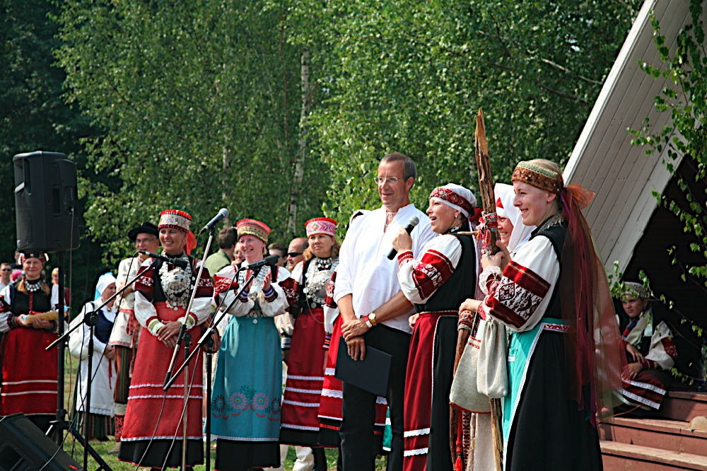 XVII Setu Kuningriigi päev Mikitamäel